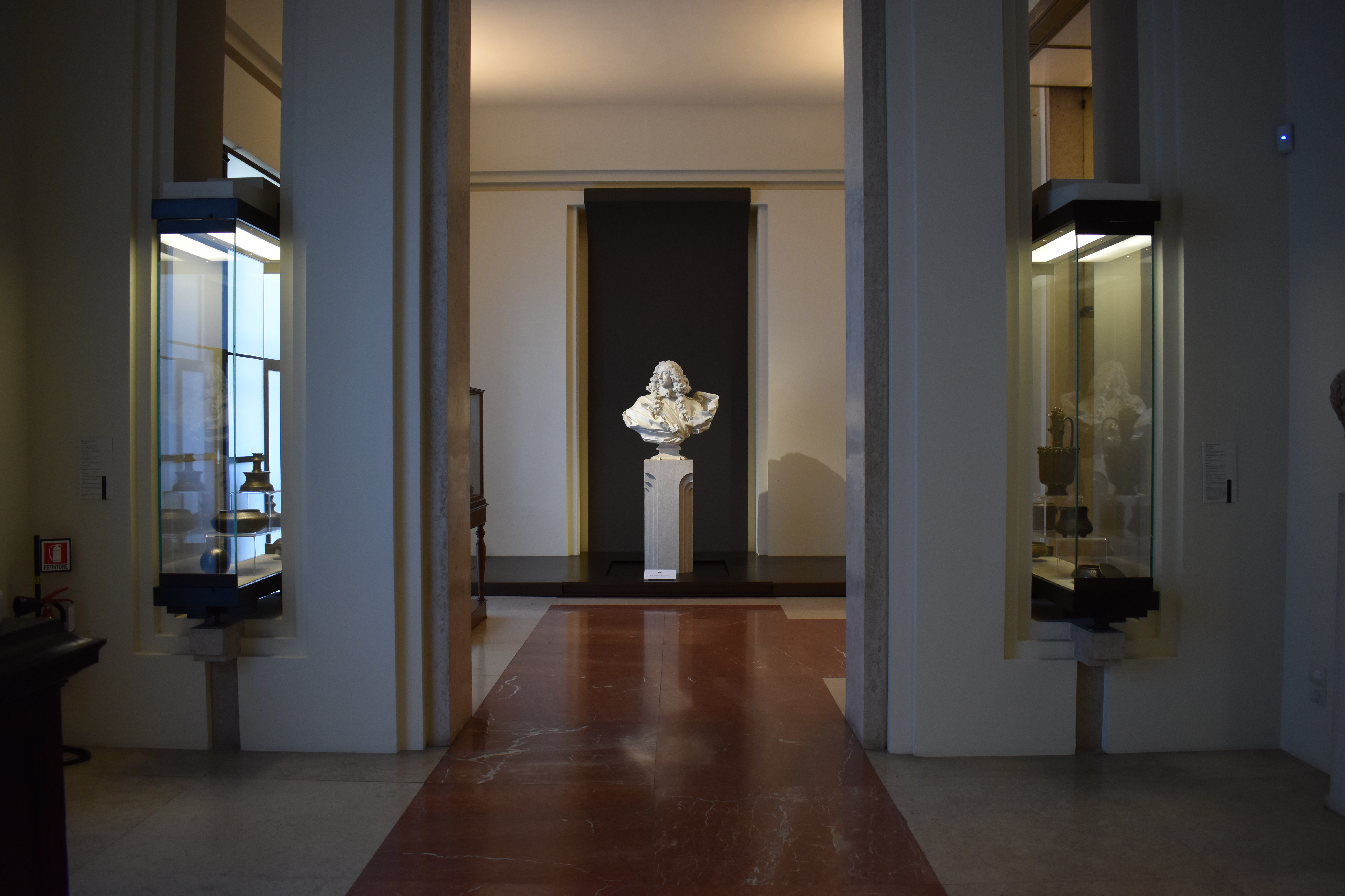 Sala d'ingresso, Gian Lorenzo Bernini, Ritratto di Francesco I d’Este, marmo, galleria Estense (Modena) This is a photo of a monument which is part of cultural heritage of Italy.